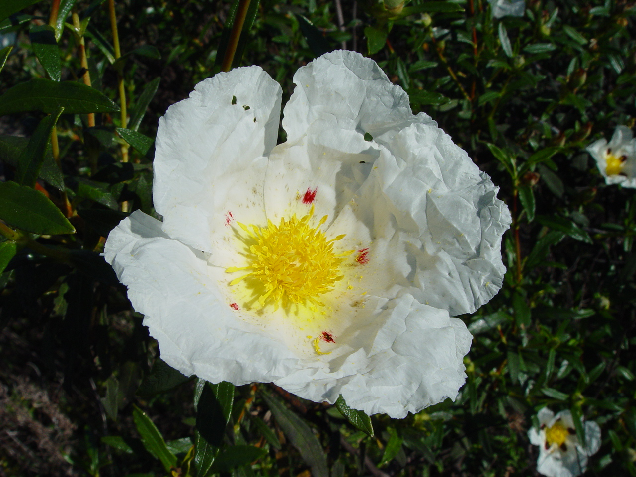 Name Cistus ladanifer Familiy Cistaceae